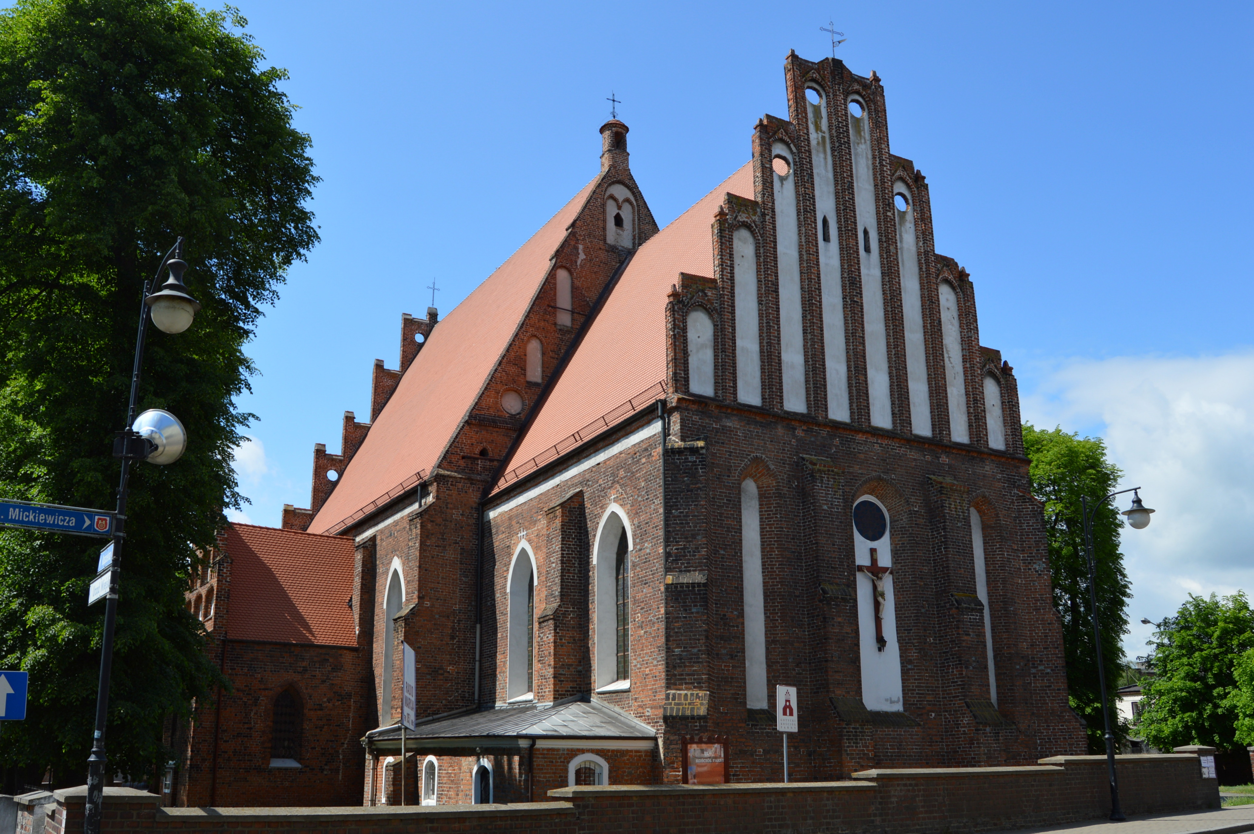 Kościół Podwyższenia Krzyża Świętego w Kole, widok od ul. Mickiewicza